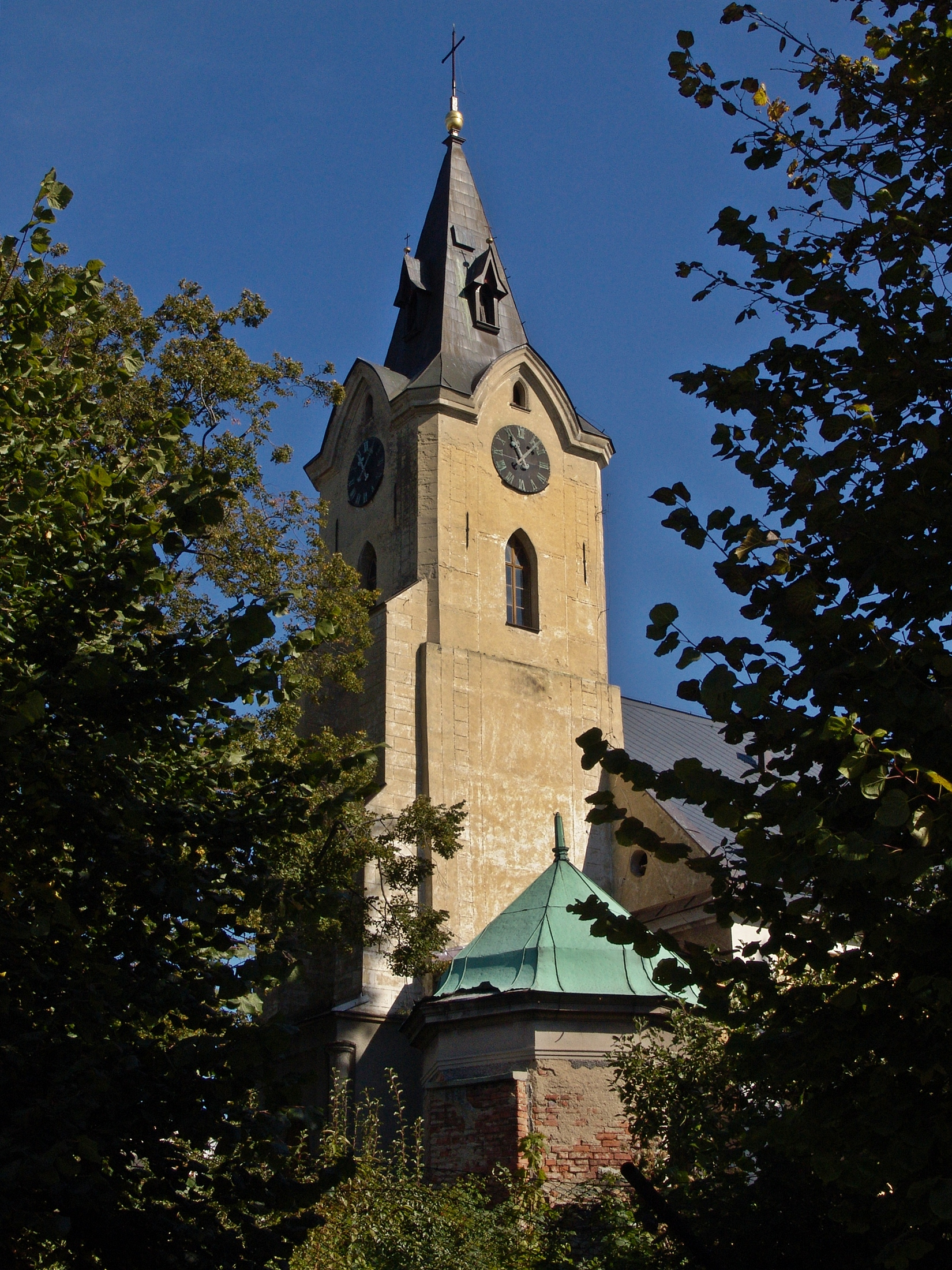 Kostel sv. Kateřiny, Školní, Horní Benešov.